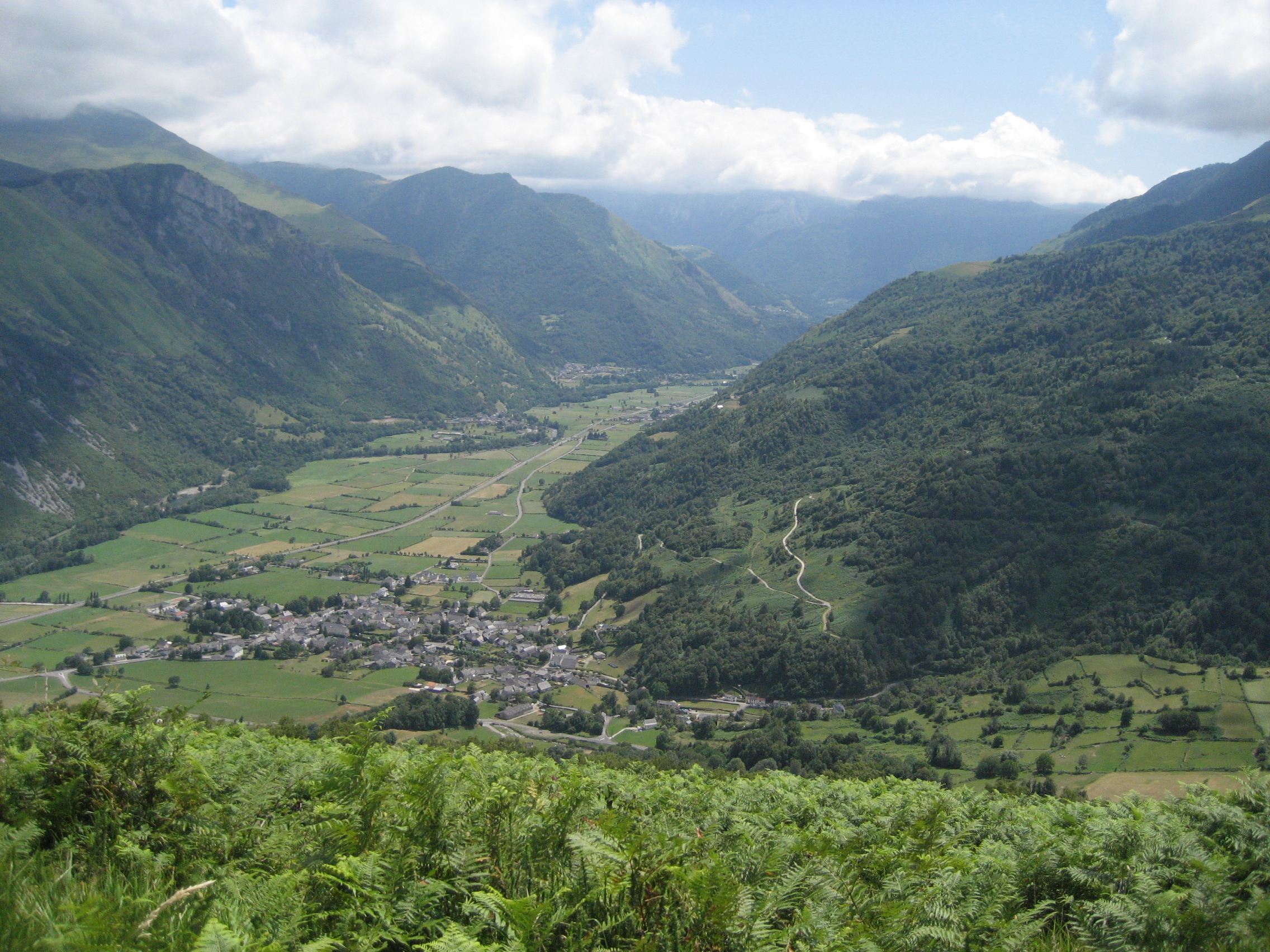 France, Pyrénées-Atlantiques (64), Bielle